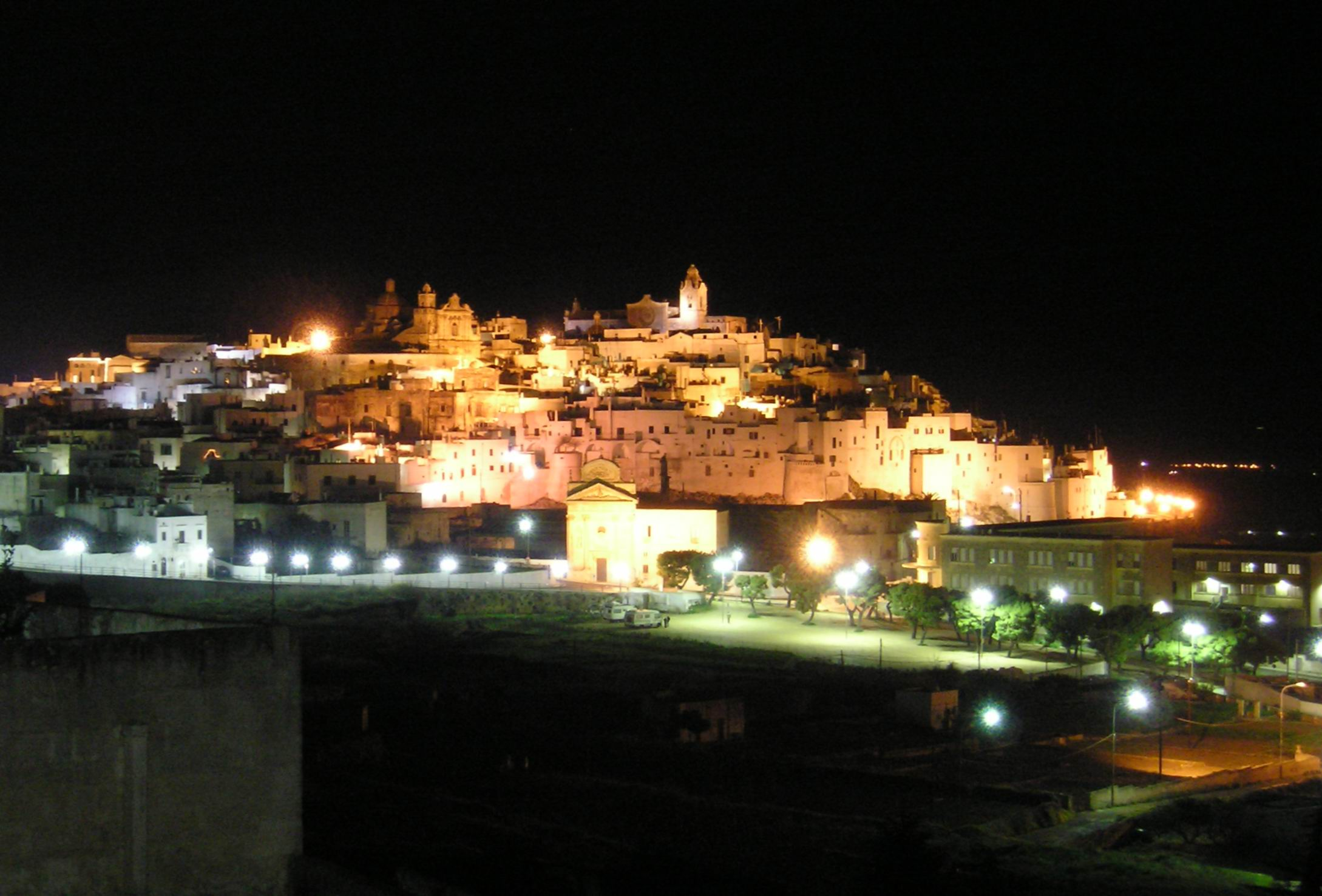 Ostuni di notte (Original text: 31 gennaio 2005)